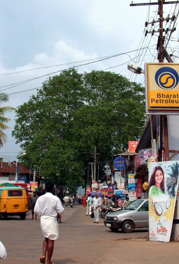 കാറിൽ ഇരുന്നെടുത്തതാണ്. ക്ഷമിക്കുക.